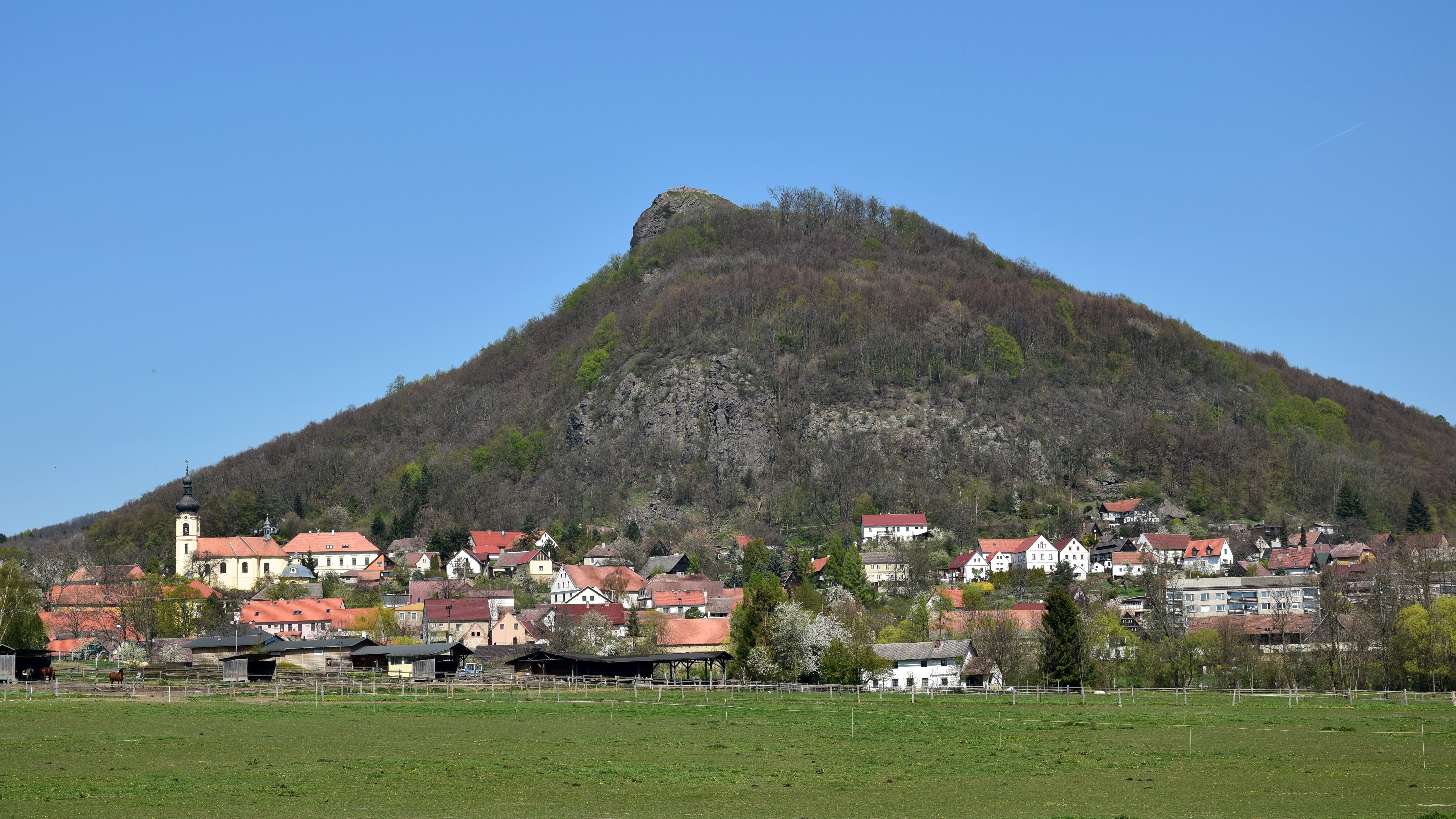 Třebušín a vrch Kalich